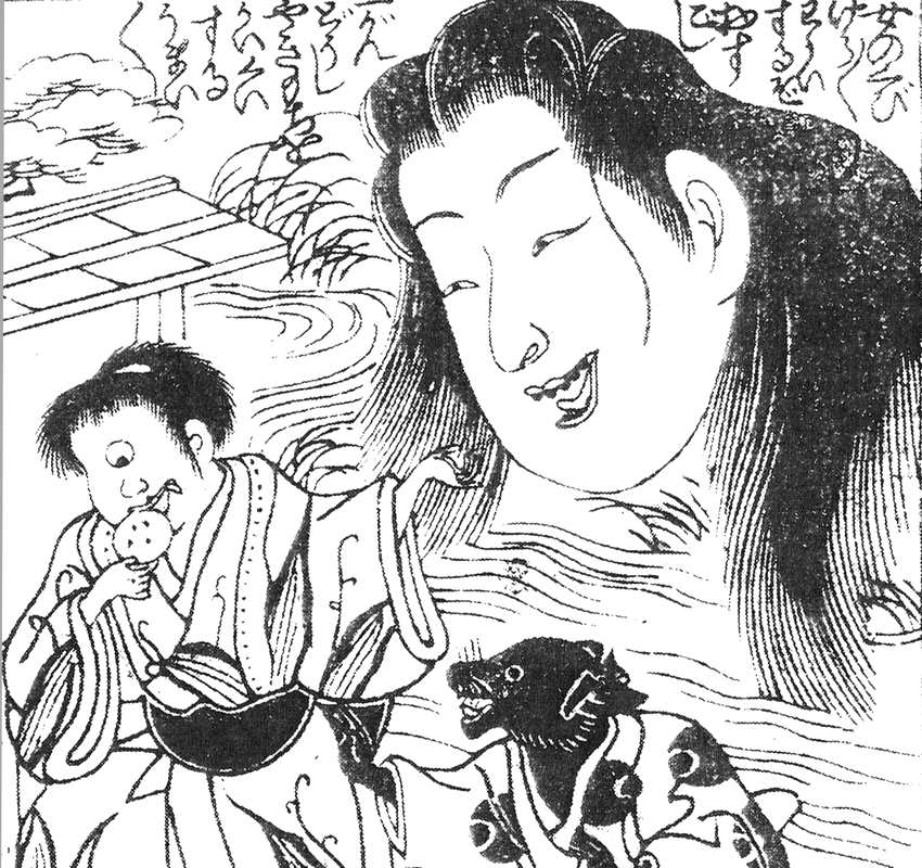 a cackling woman from Heike bakemono taiji (平家化物たいぢ, Kusazōshi)